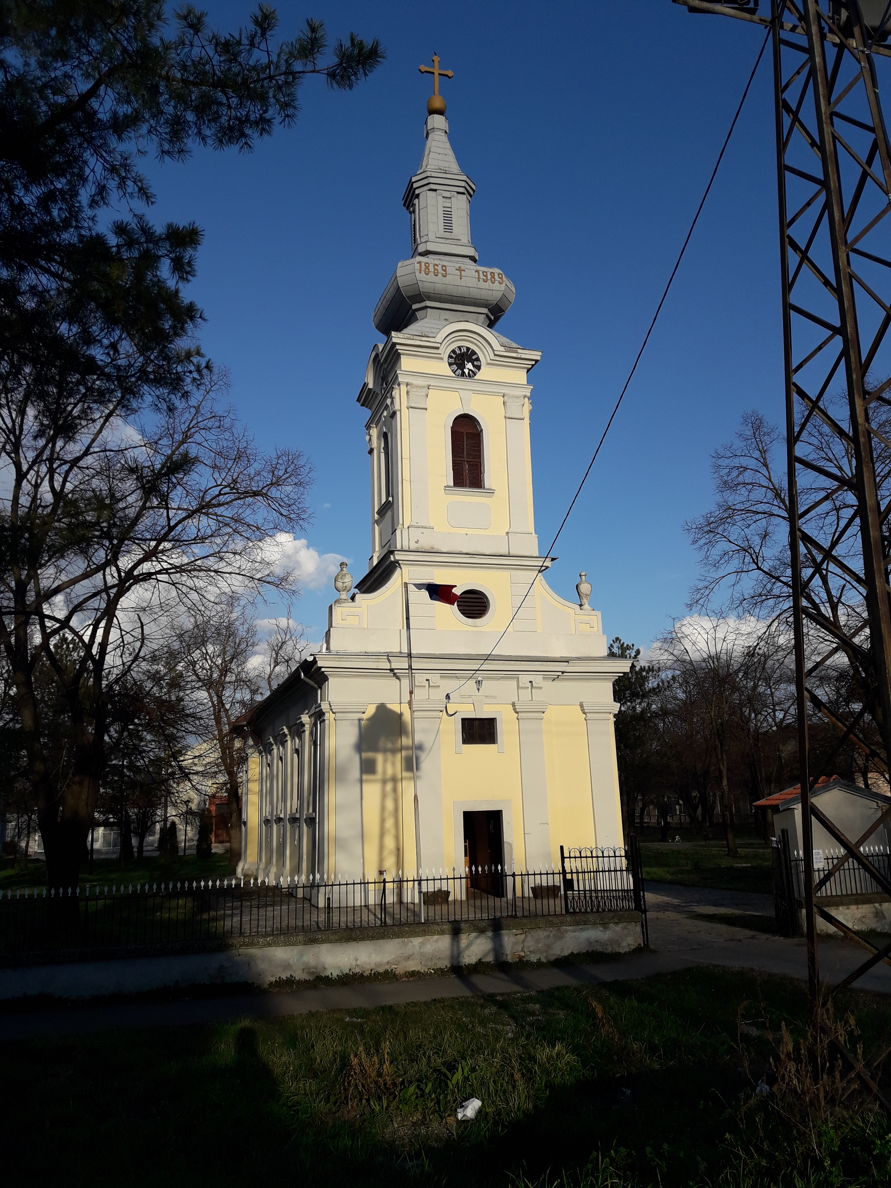 Pravoslavna crkva u Idvoru.